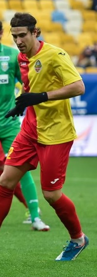 Борха Экиса - испанский футболист